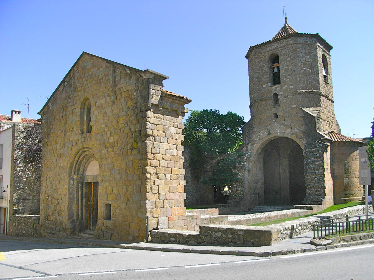 Restes de l'església de Sant Pol, a Sant Joan de les Abadesses.